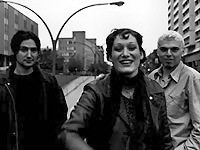 Photo des Lili Fatale à Montréal en 1999. Photographe : Rafael Sottolichio